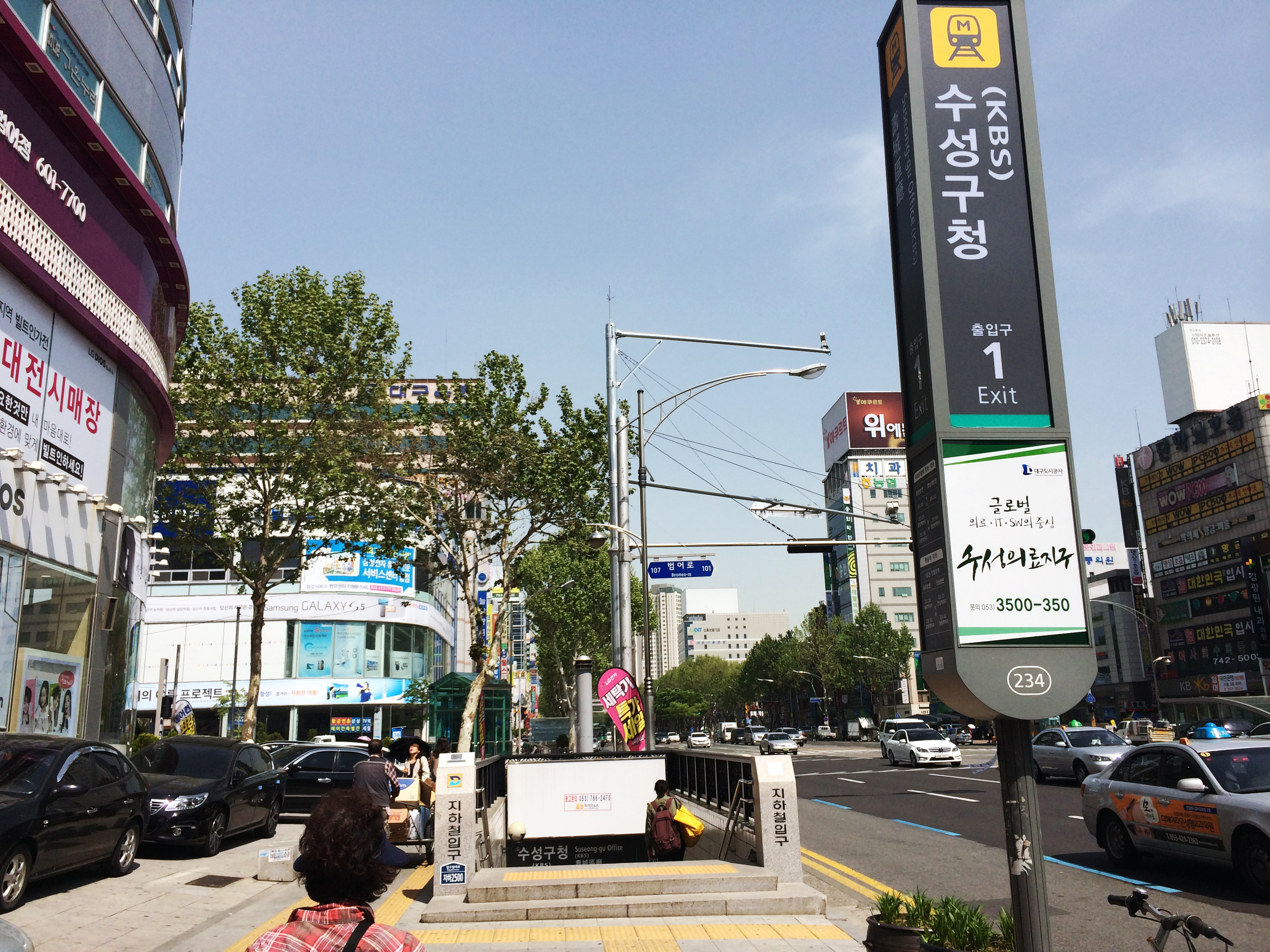 수성구청(KBS)역 1번 출입구